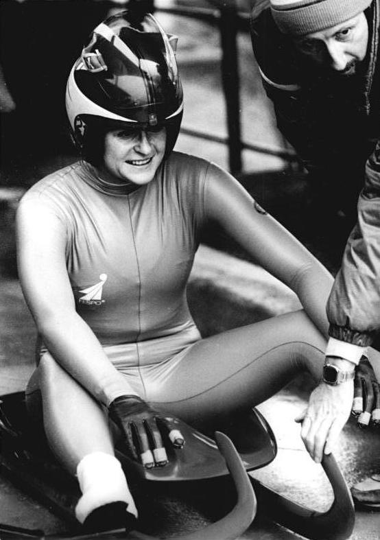 Gabriele Kohlisch ADN-ZB Hiekel 4.3.1989-Altenberg: DDR-Meisterschaft im Rennschlittensport-Gabriele Kohlisch (SC Traktor Oberwiesenthal) führt bei den Damen nach zwei von drei Durchgängen.